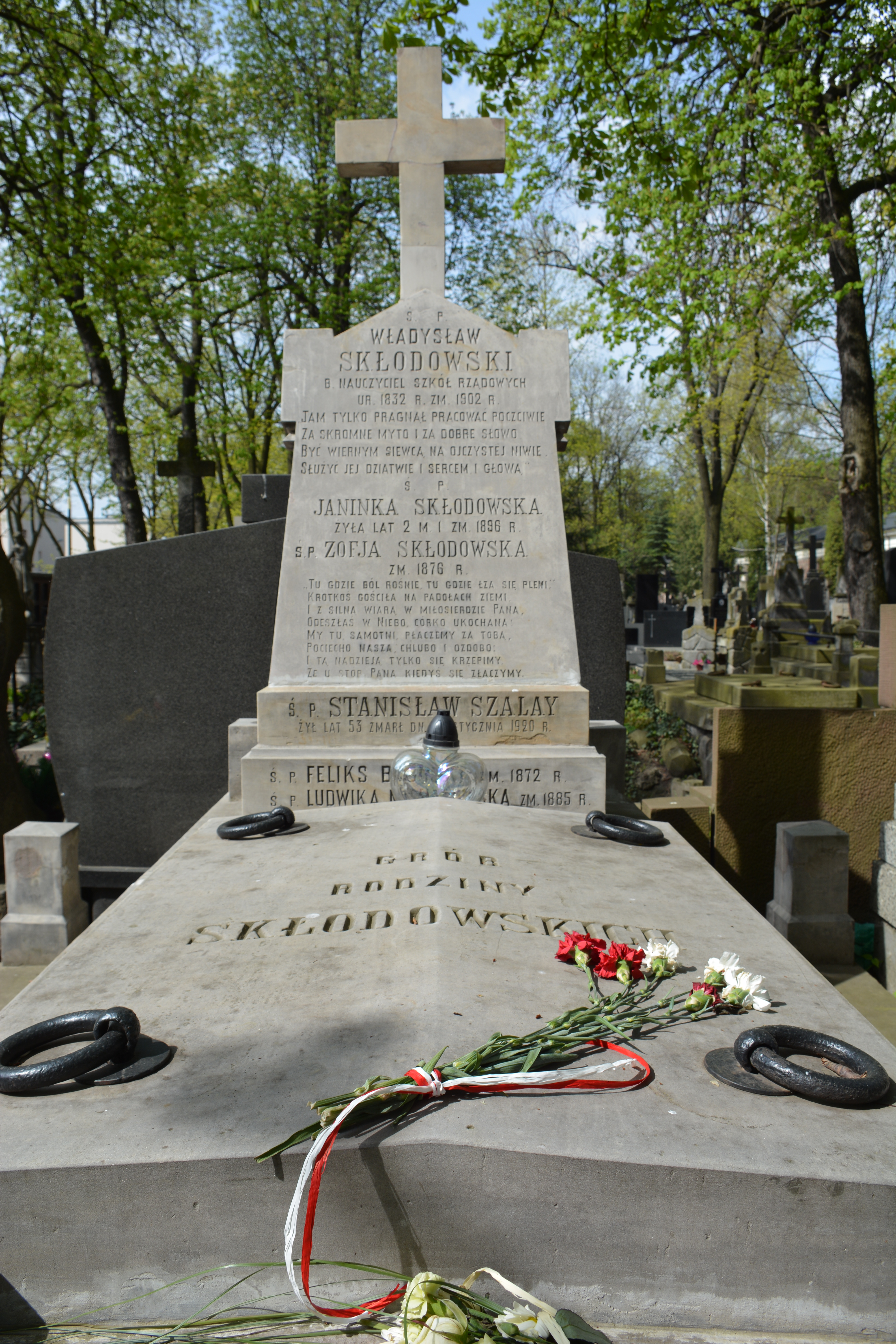 Powązki, Warszawa, Poland